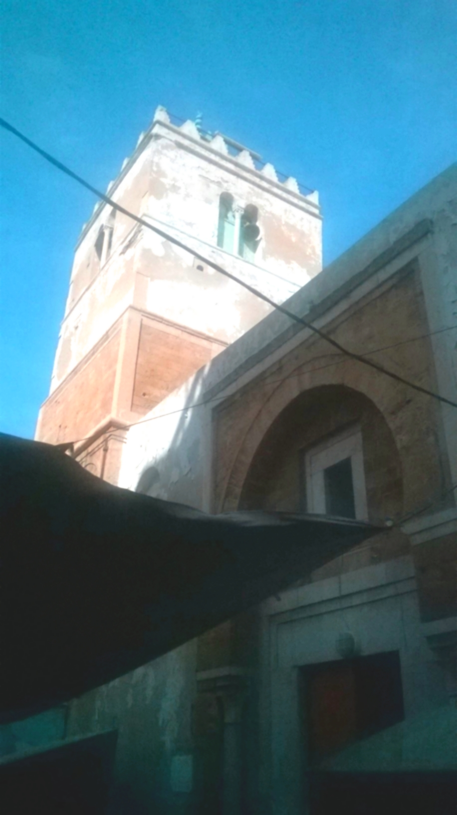 Rue Des Teinturiers, medina de Tunis الصباغين , مدينة تونس